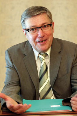 Portrait Septembre 2012.